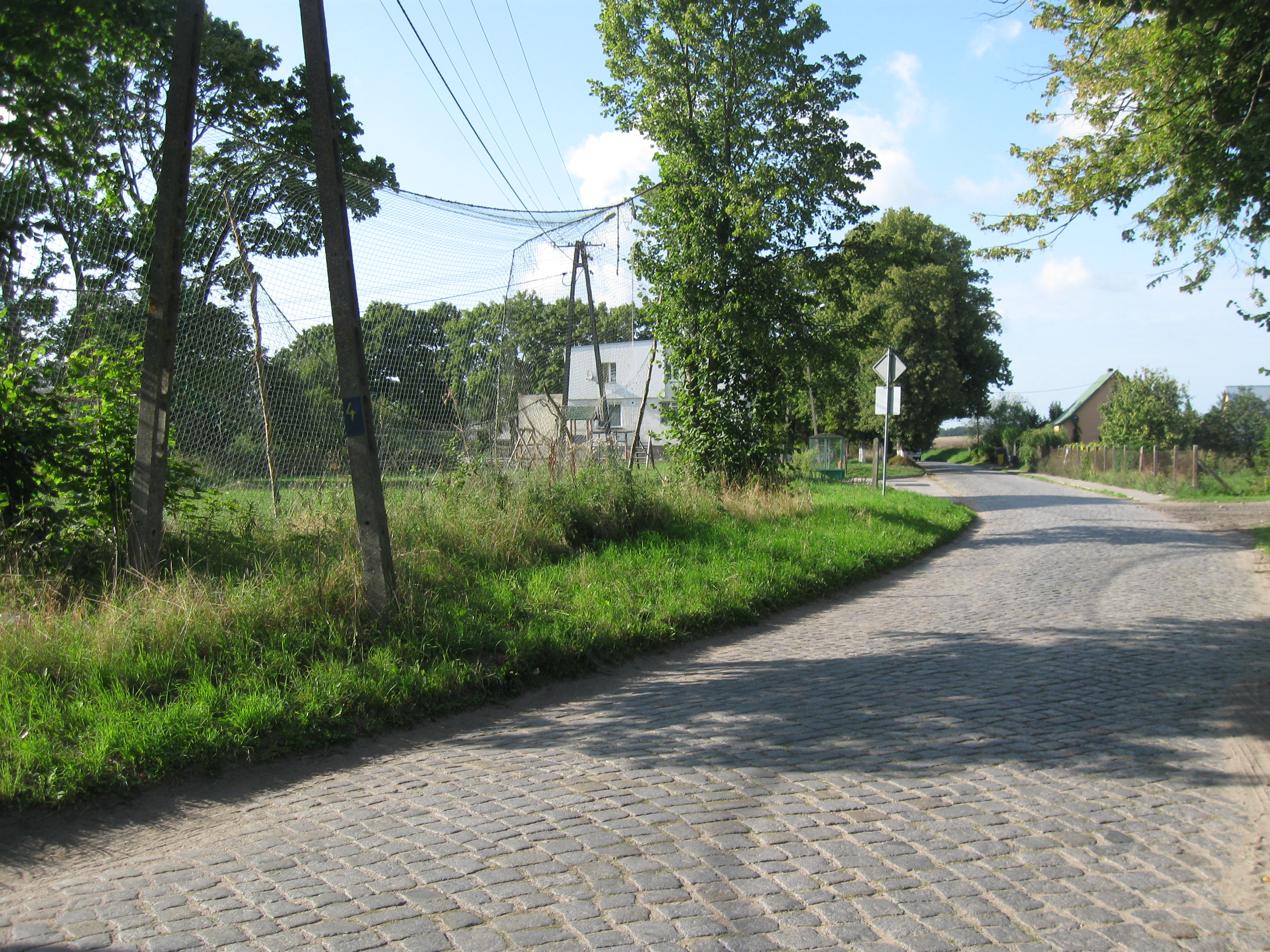 Centrum właściwego Kędrzyna - droga biegnąca w kierunku drogi wojewódzkiej nr 162